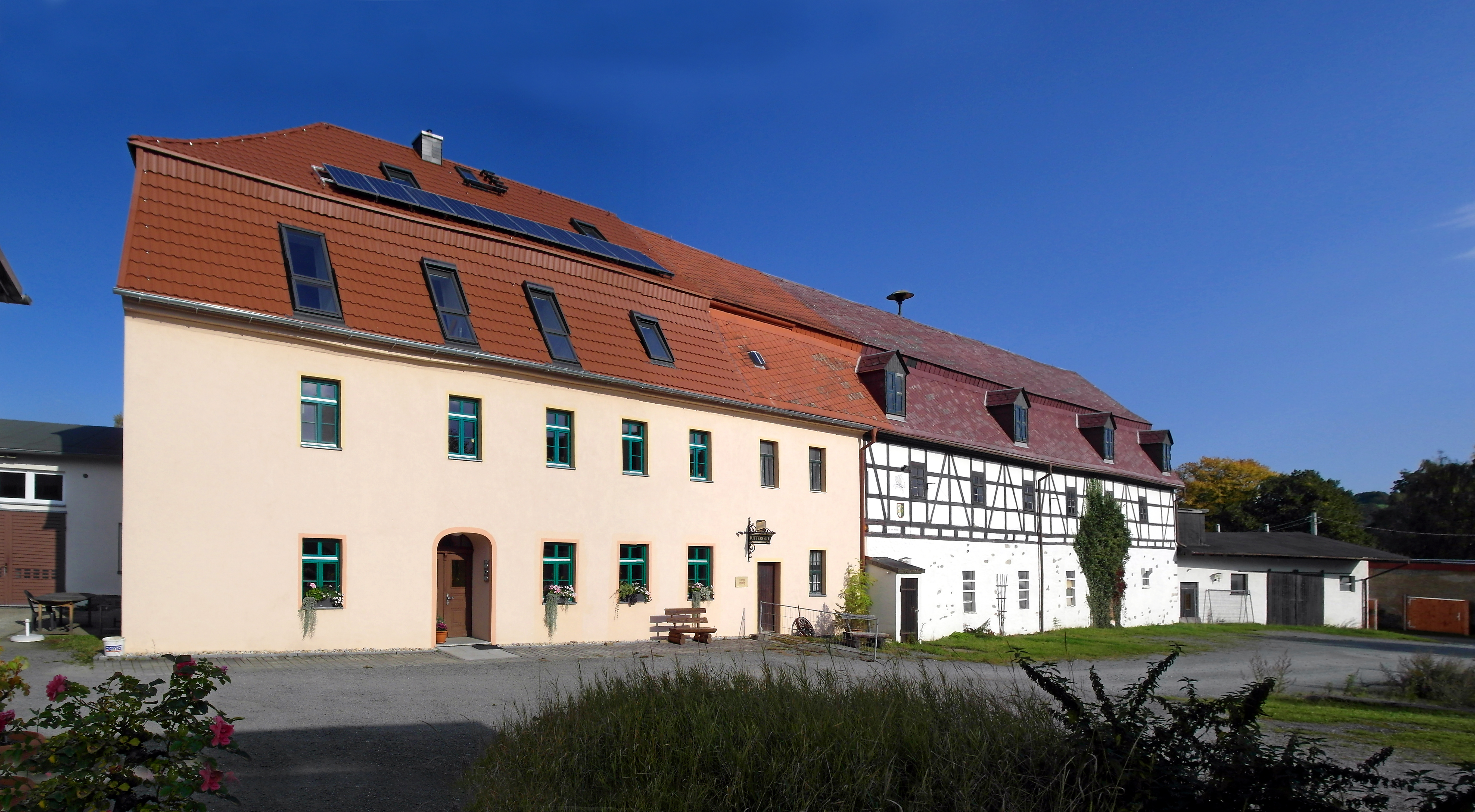 29.09.2017 09430 Venusberg, Herolder Straße 2 (GMP: 50.699322,13.013849): Ehemaliges Rittergut, Hofseite. Das heutige Herrenhaus (links) wurde erst um 1830 an das Stallgebäude (rechts) aus dem frühen 18. Jahrhundert angebaut. [SAM2224+26.JPG]20170929405MDR.JPG(c)Blobelt